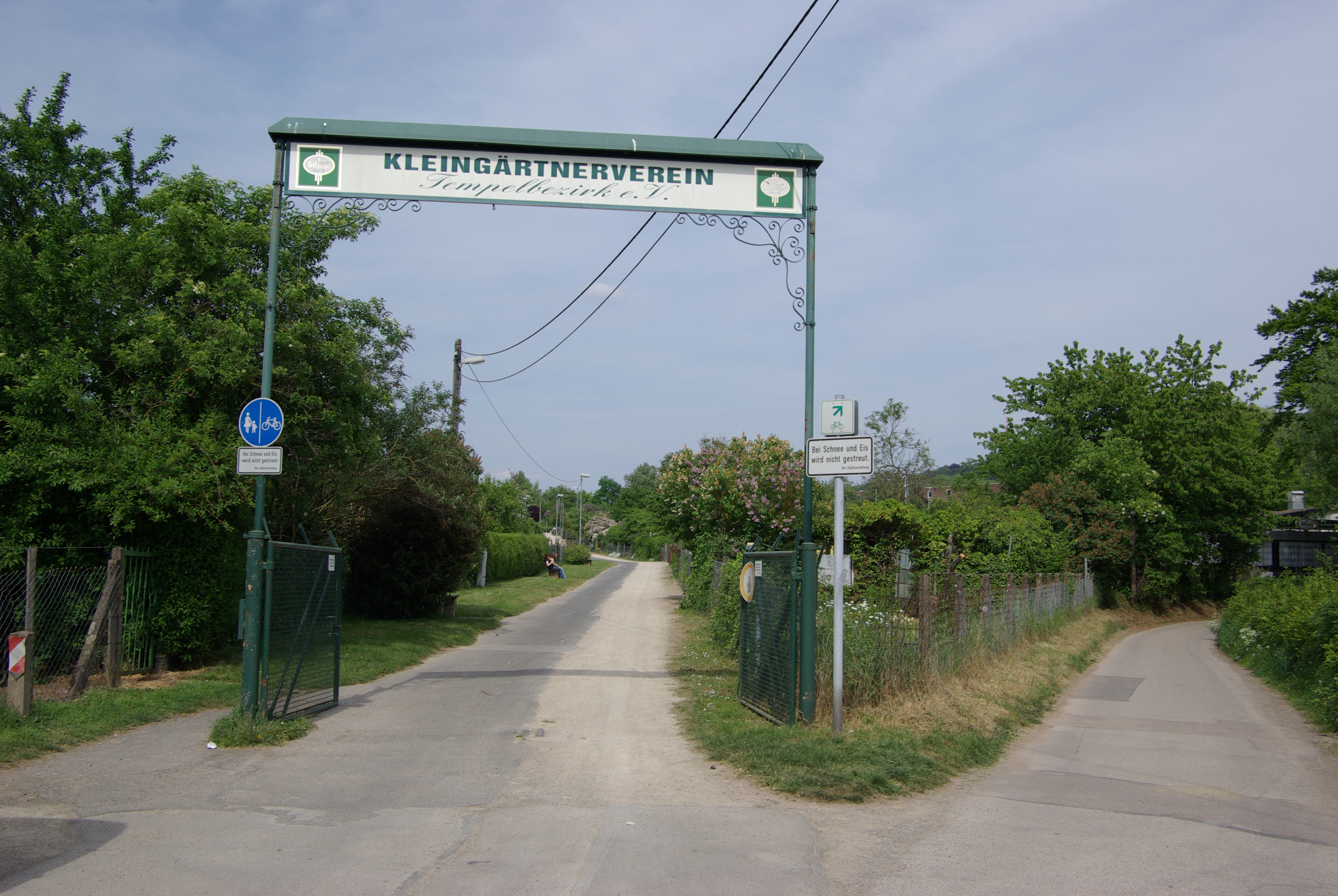 Trier, Gelände ehemaliger Tempelbezirk Altbachtal